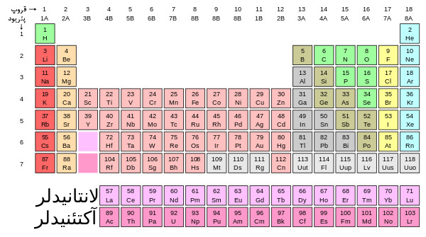 تۆرکجه: کیمیاسال المنتلرین تابلوسو